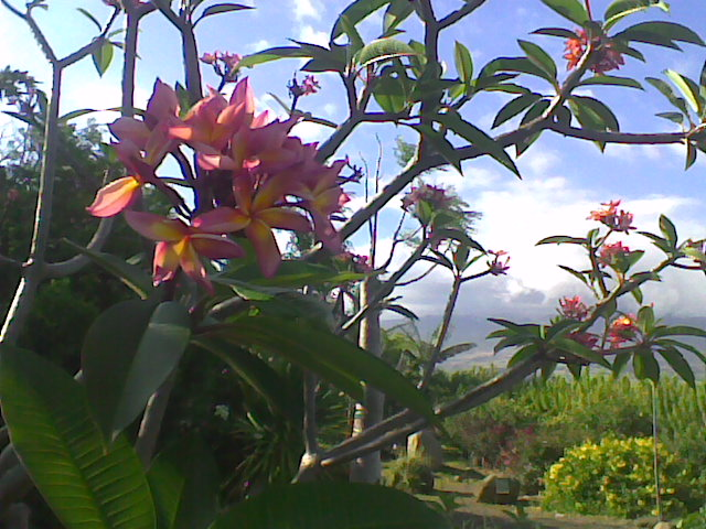 Autre variété de badamier de couleur rose